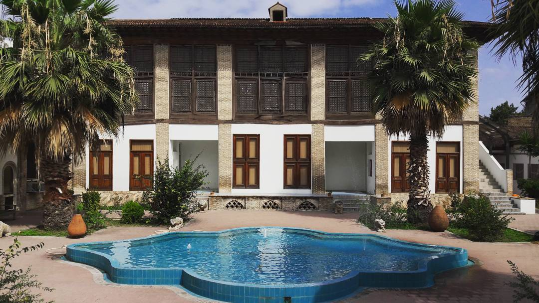 خانه منوچهر خان کلبادی